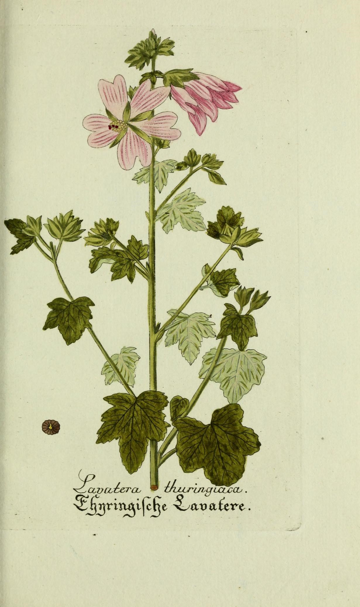 Plantarum indigenarum et exoticarum icones ad vivum coloratae, oder, Sammlung nach der Natur gemalter Abbildungen inn- und ausländlischer Pflanzen, für Liebhaber und Beflissene der Botanik /